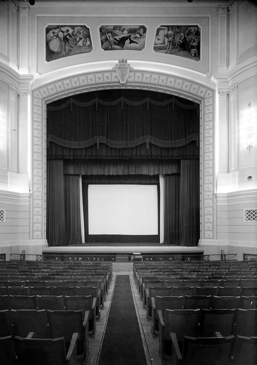 Teatre Principal abans de la reforma del 1986